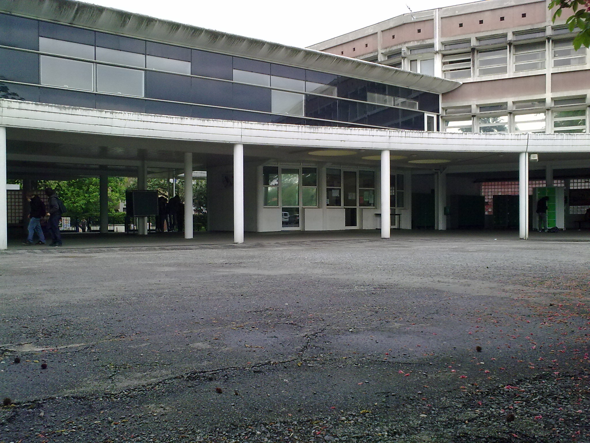 lycée Saint - Cricq, Pau, France